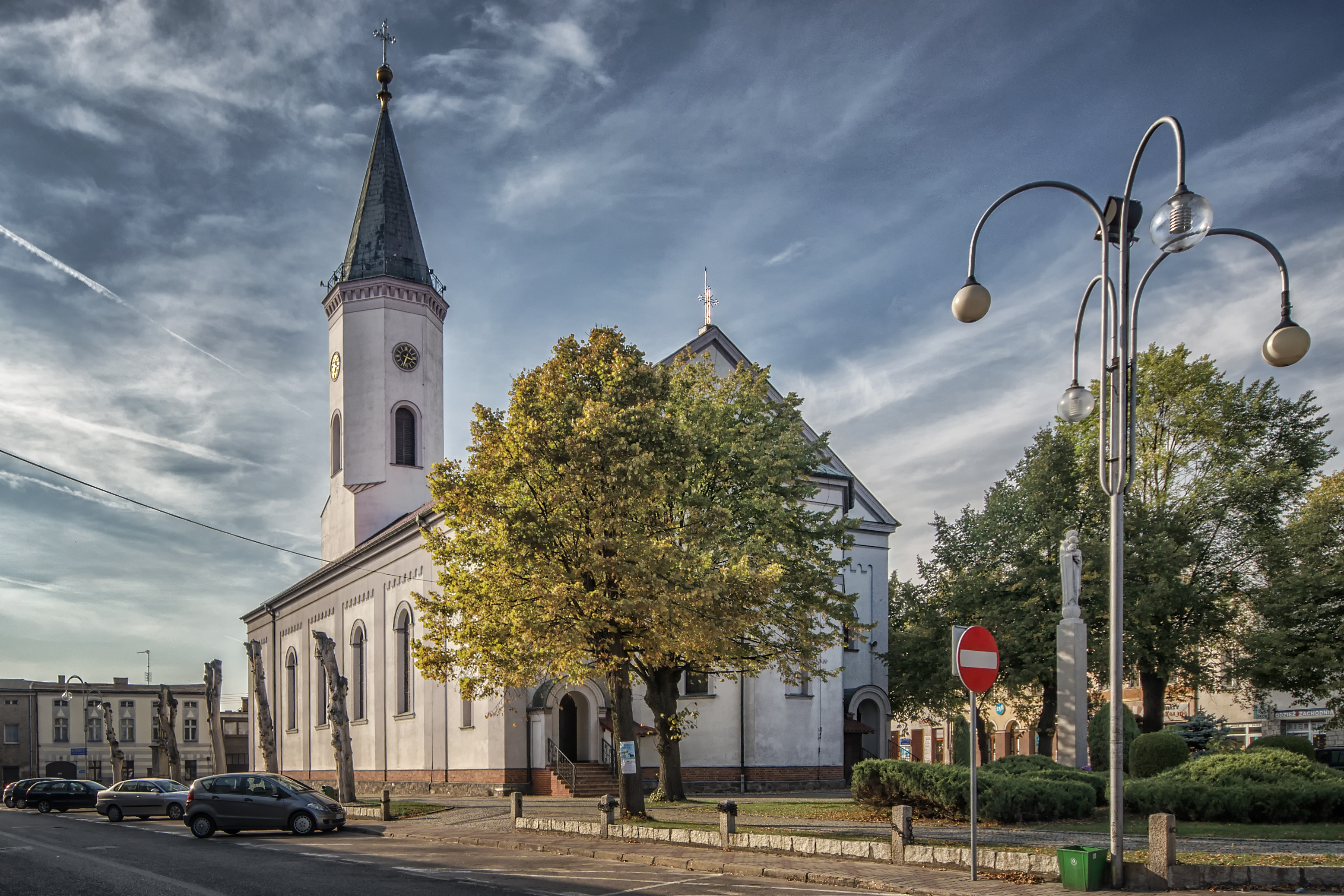 Dobrodzień, zespół kościoła par. p.w. św. Marii Magdaleny, 1851-1854